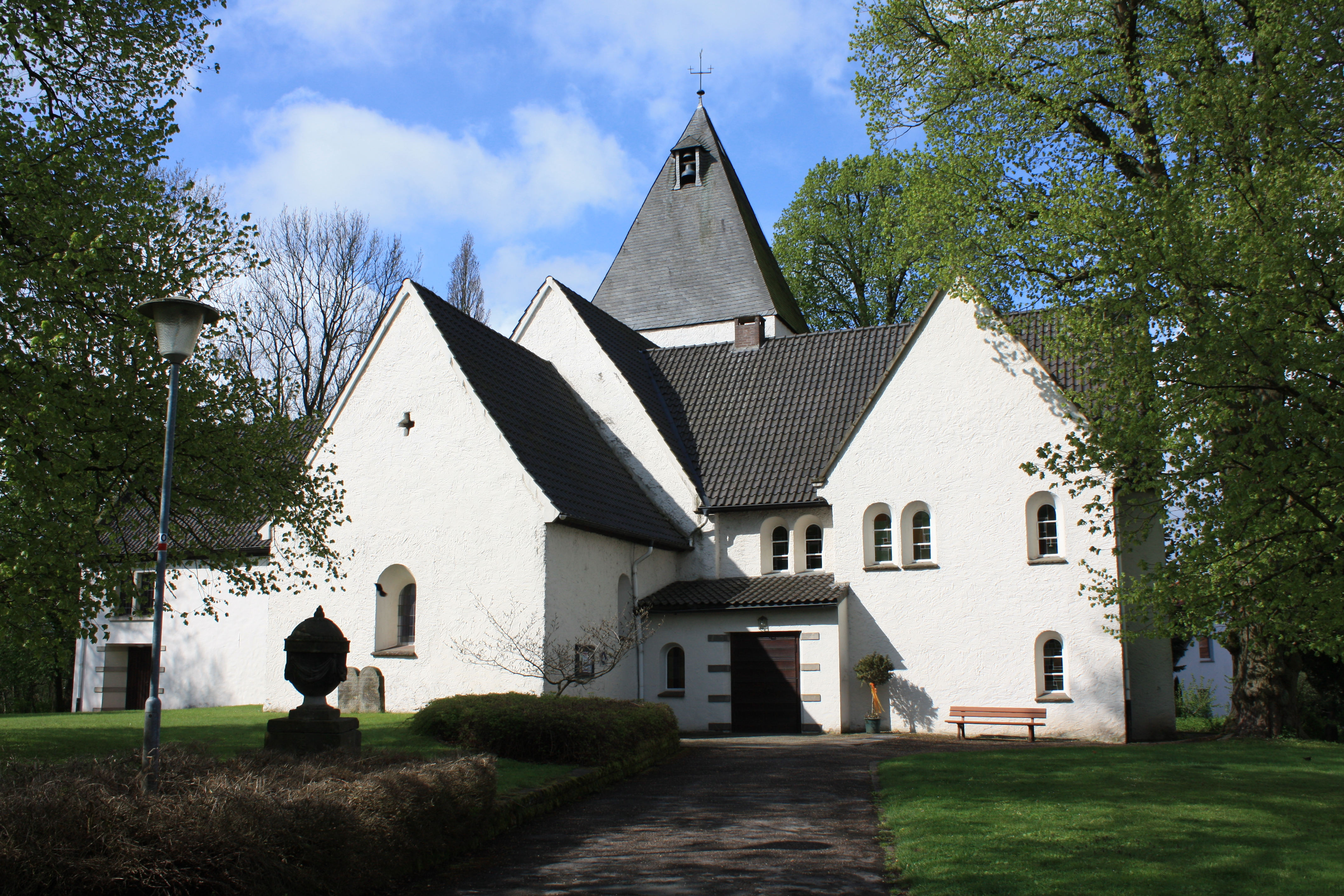 e